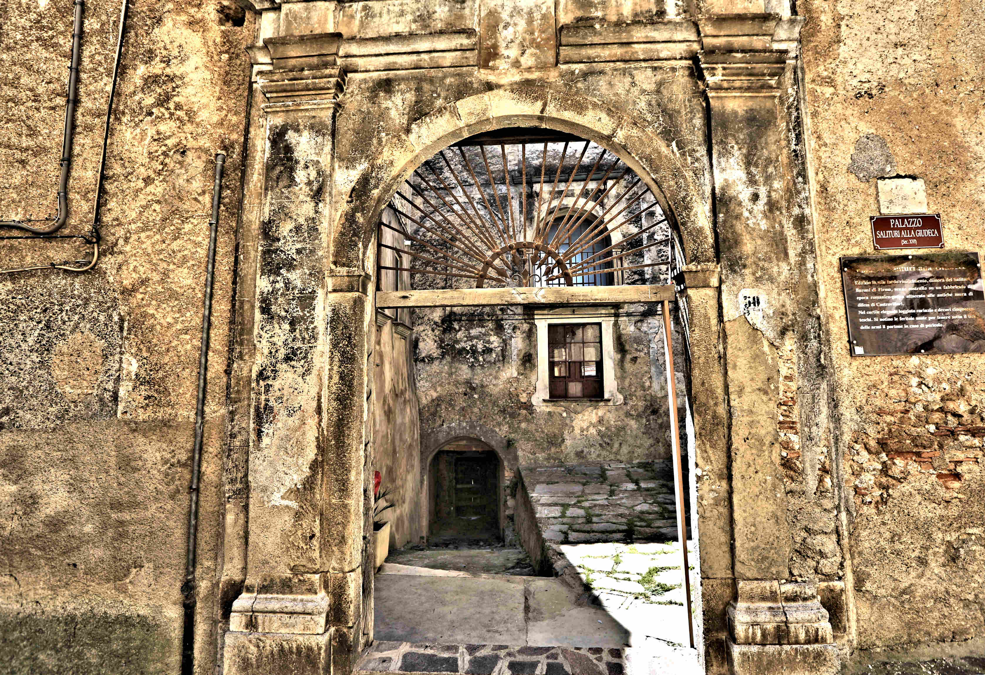 Complesso monumentale, antica dimora signorile cinquecentesca nel cuore del centro storico, attualmente Palazzo Caligiuri-Cassanese, alla via Giudecca del quartiere Civita della città di Castrovillari (CS)